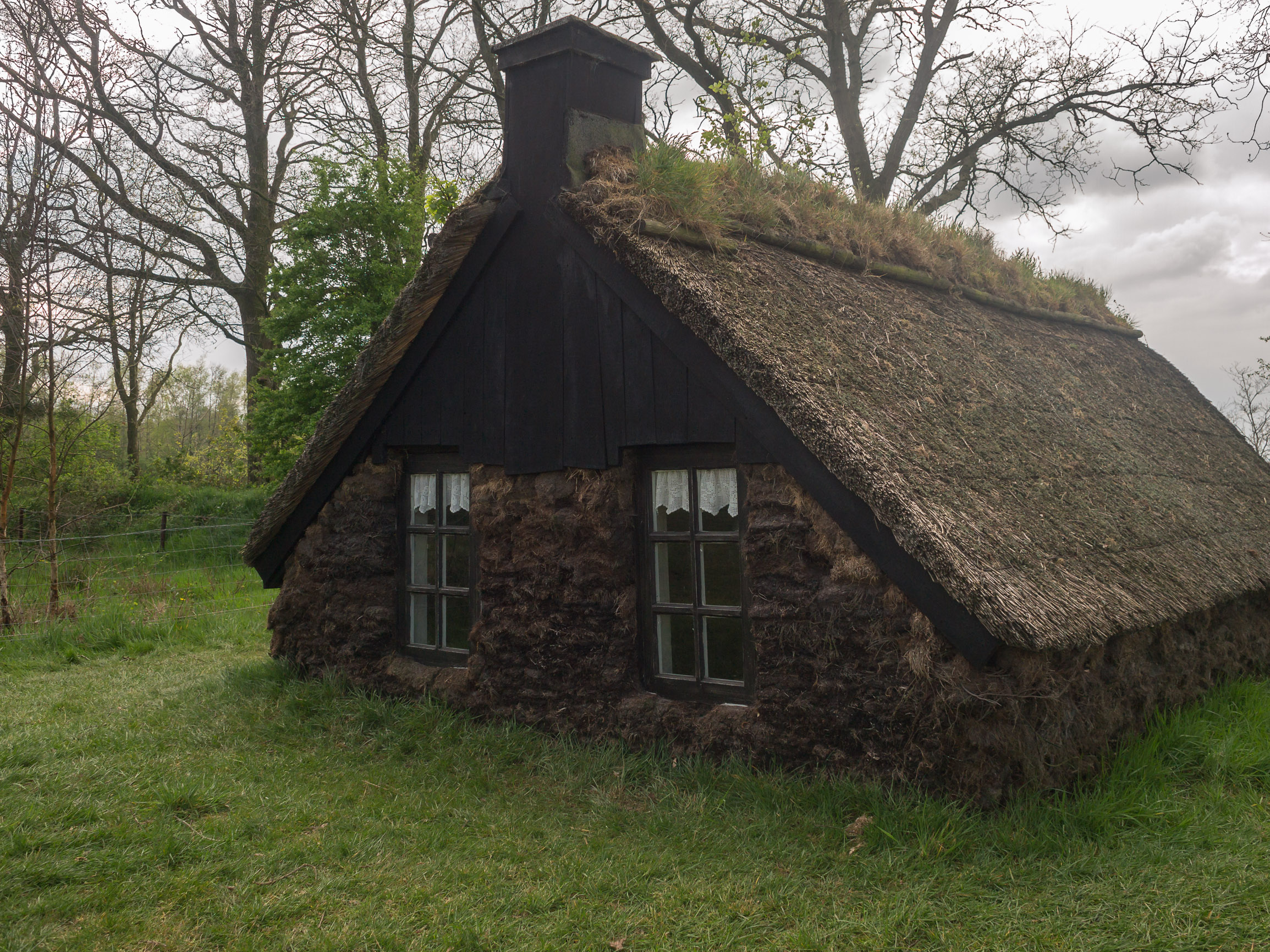 Plaggenhut - Themapark de Spitkeet, Harkema